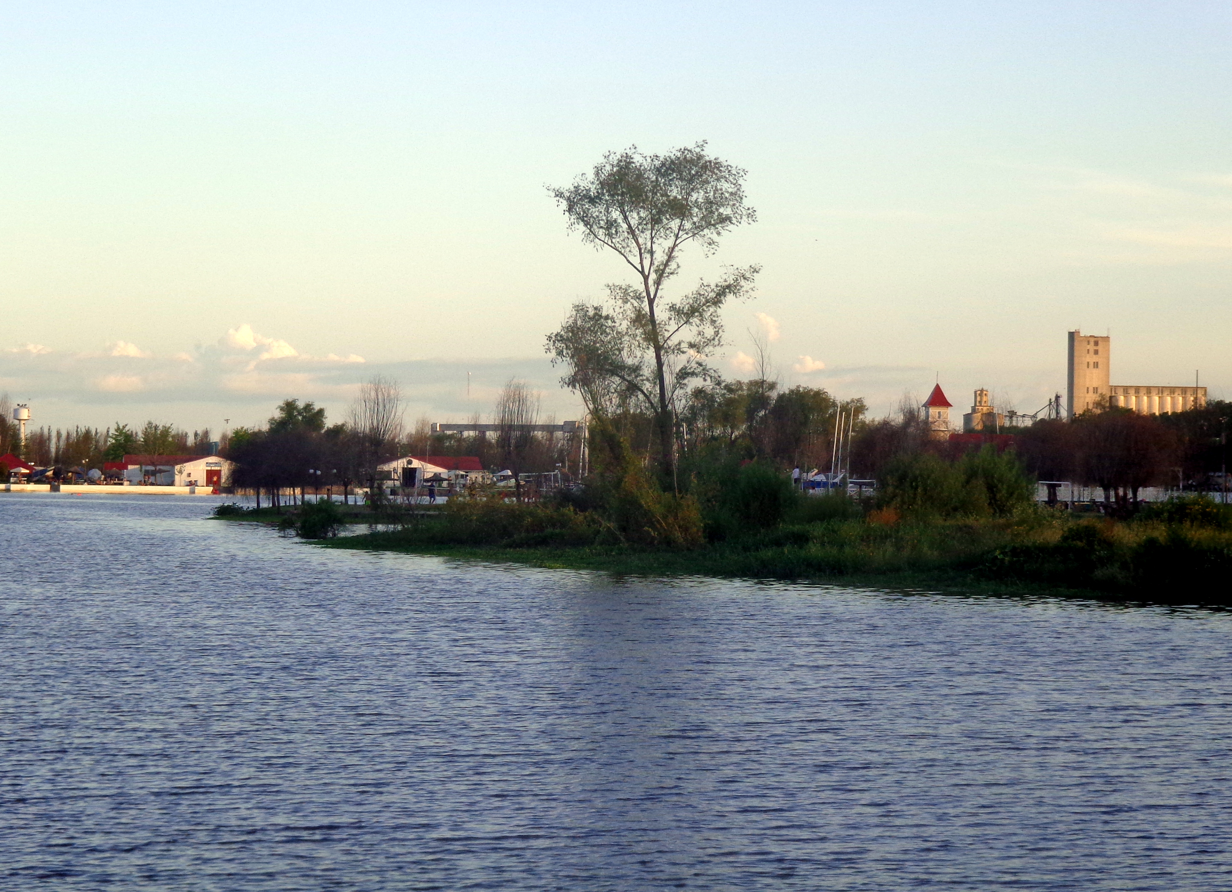 Club Náutico, costanera de San Pedro, Provincia de Buenos Aires, Argentina.